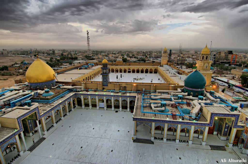 صورة لمسجد الكوفه المعظم مع الصحن الجديد لمرقدي مسلم بن عقيل وهاني بن عروةرضوان الله عليهما